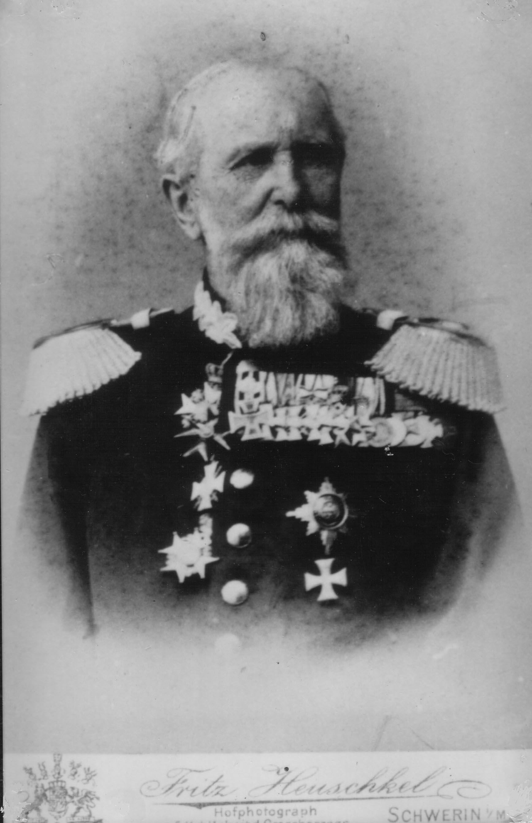 Mecklenburgischer Generalmajor Friedrich Heinrich Ludolph von Zülow